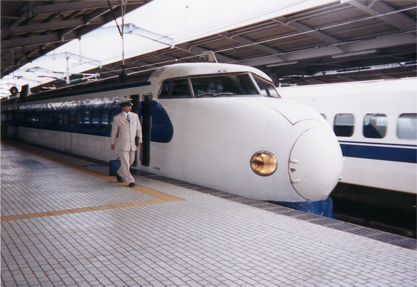 撮影日不明。おそらくNH32編成ラストランの日撮影。